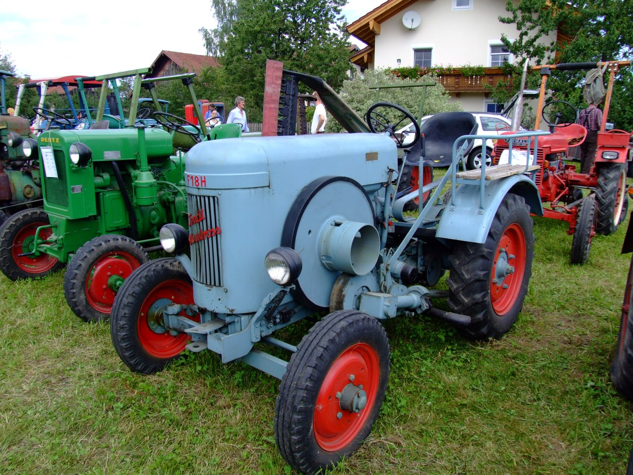 Fendt Dieselross F18H mit 12 PS, Baujahr 1949